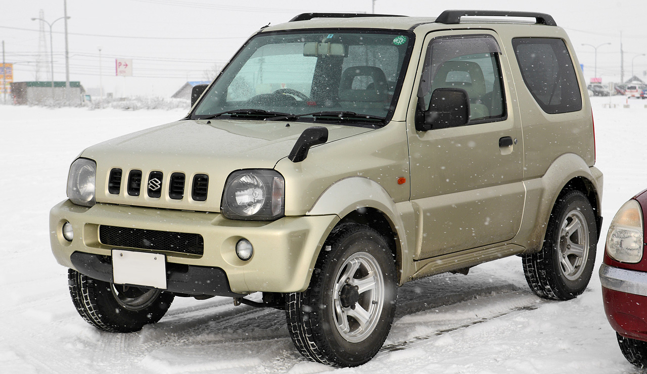 Suzuki Jimny Wide ( JB33 )